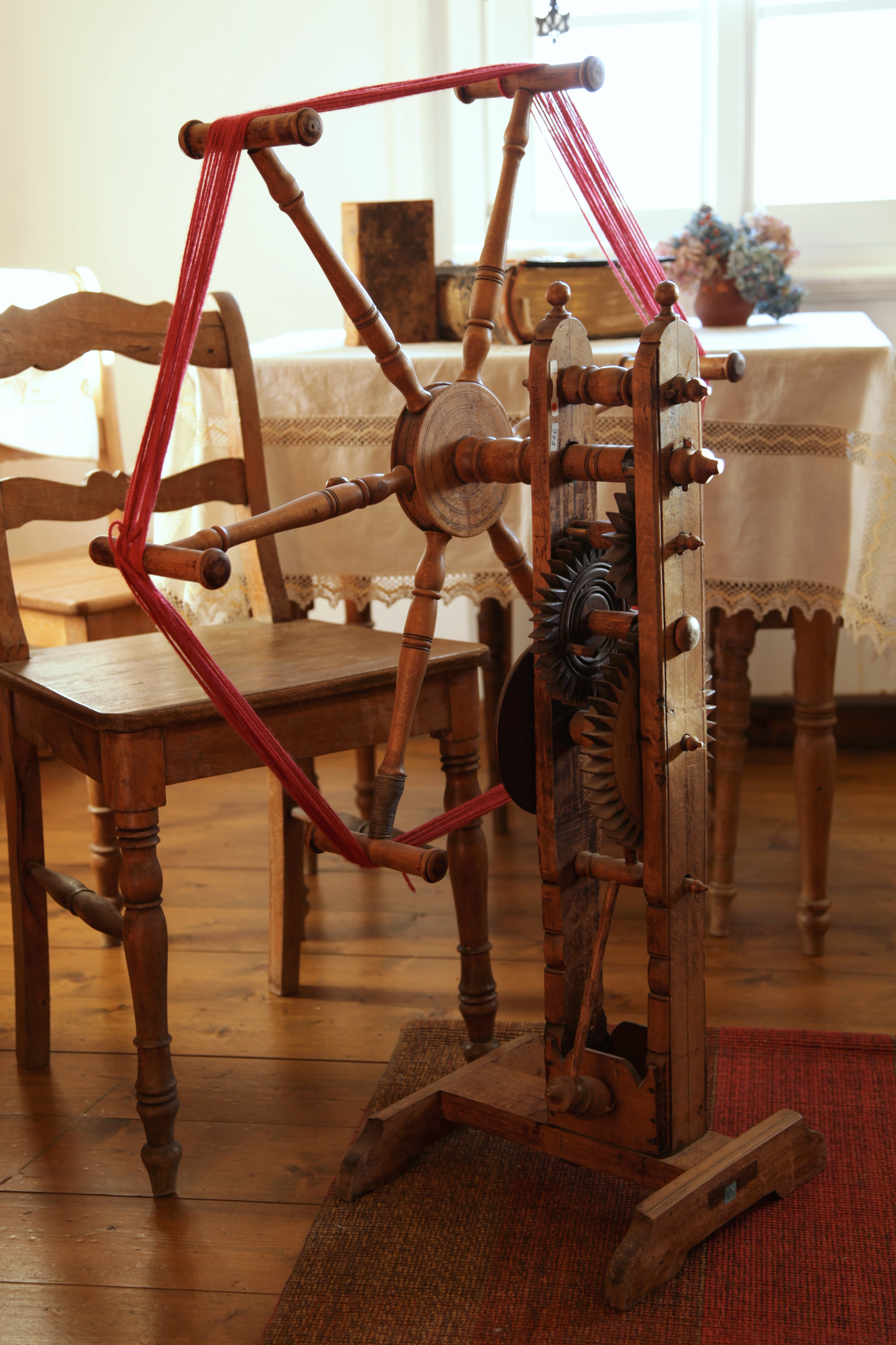 Heimatmuseum, Wallstraße 1 in Bergneustadt